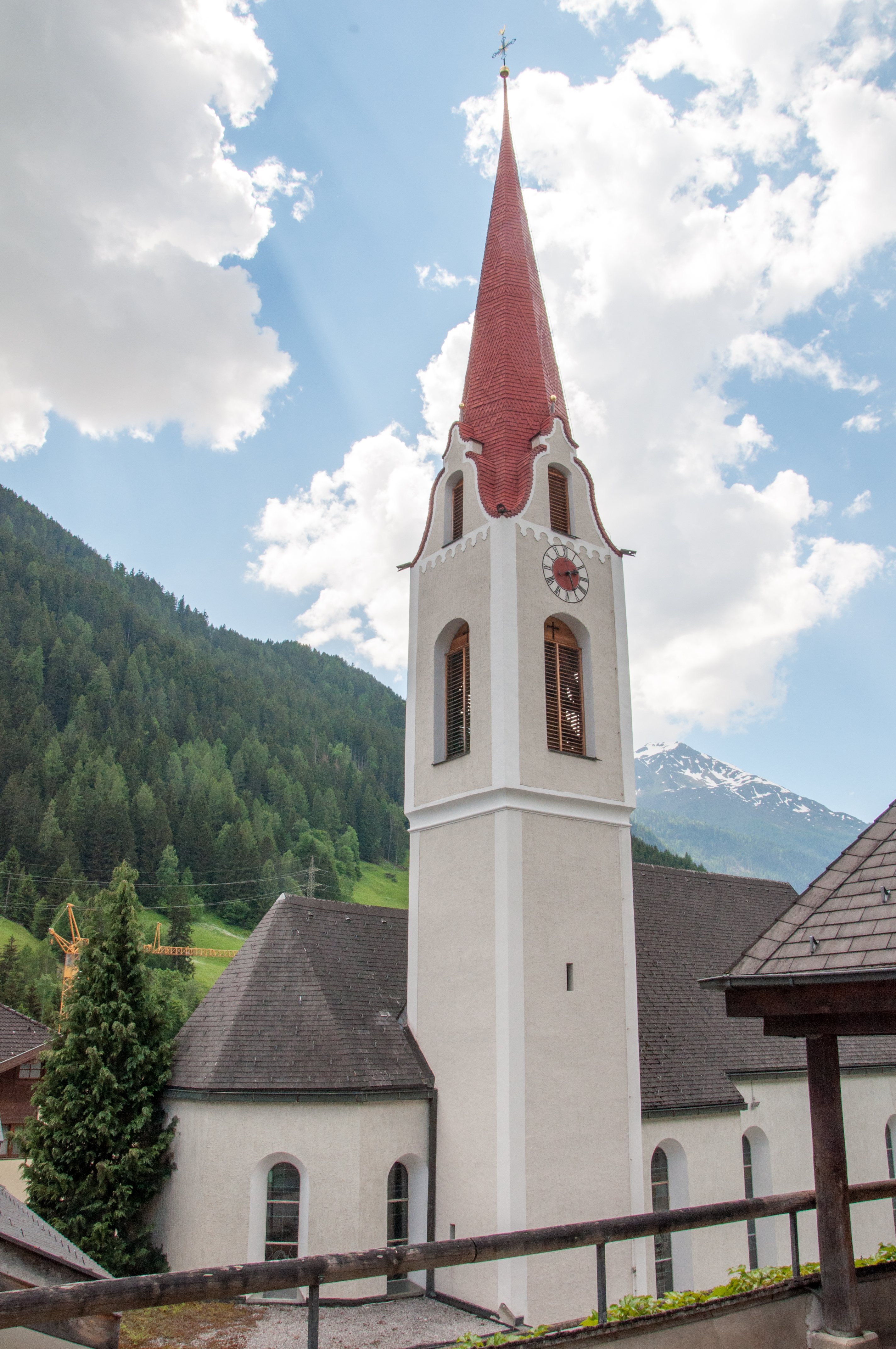 Kath. Pfarrkirche hl. Martin